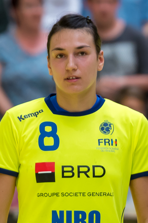 Damenhandball WM-Qualifikation Playoff Österreich vs Rumänien am 13. Juni 2017 in Stockerau. Bild zeigt Cristina Georgiana Neagu (ROU).